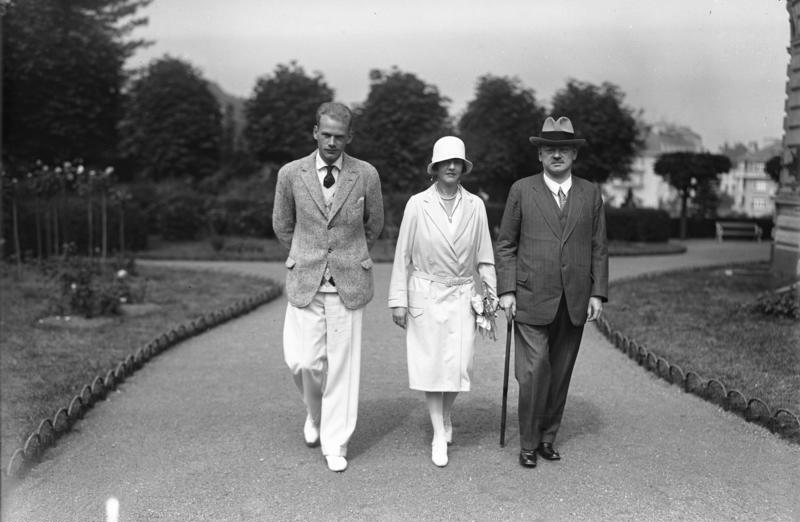 Der deutsche Reichsaussenminister und Friedens-Nobel-Preisträger Dr. Stresemann gestorben! Letzte Aufnahme des Reichsaussenministers Dr. Stresemann mit seiner Gattin und seinem Sohn im Kurgarten in Karlsbad.